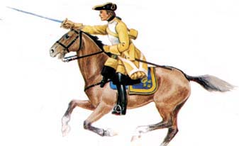 Karolinerryttare